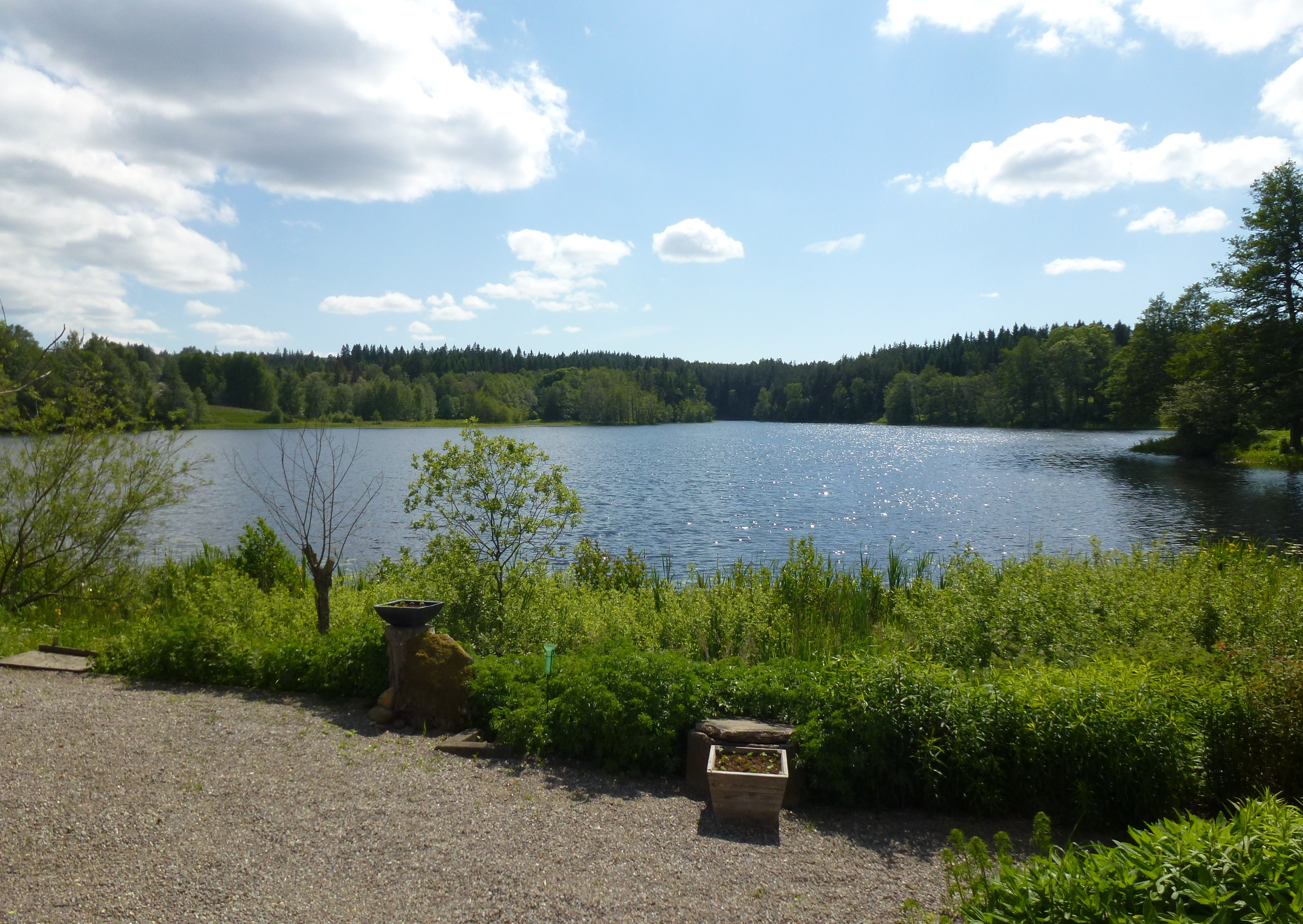 Bysjön, Botkyrka vy från sjöstugan